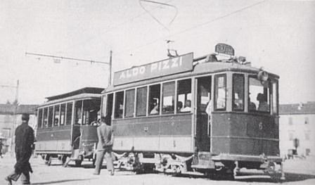 Ancona - Tram urbano